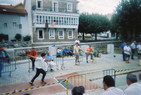 Joven jugando al pasabolo tablón en la localidad de Ampuero (Cantabria, España). Campeonato de España categoría cadete.